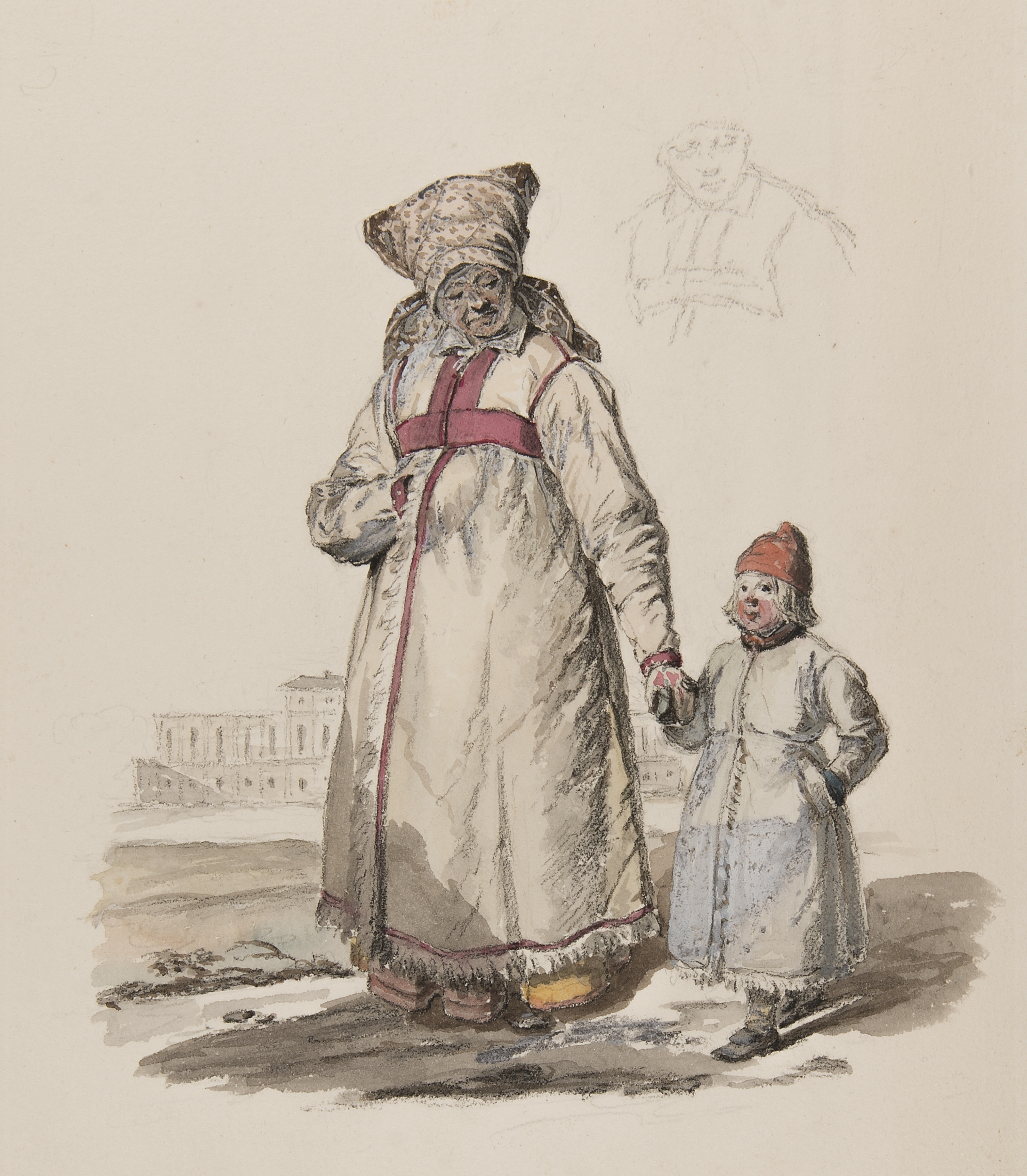 Dräkt. Kvinna med barn i helfigur. "Wingåkersboar uti vinterdräkt." Text på baksidan: "Vinterdräkt för kvinnor och barn, v. Vingåkers sn Oppunda hd, Södermanland. Akvarell af Johan Gustaf Sandberg (1782-1854) Nordiska museet 8050qb" Depicted place: Q10610926 (Q10610926) (Härad), Vingåker sn (Ortnamn därutöver), Södermanland (Q626062)